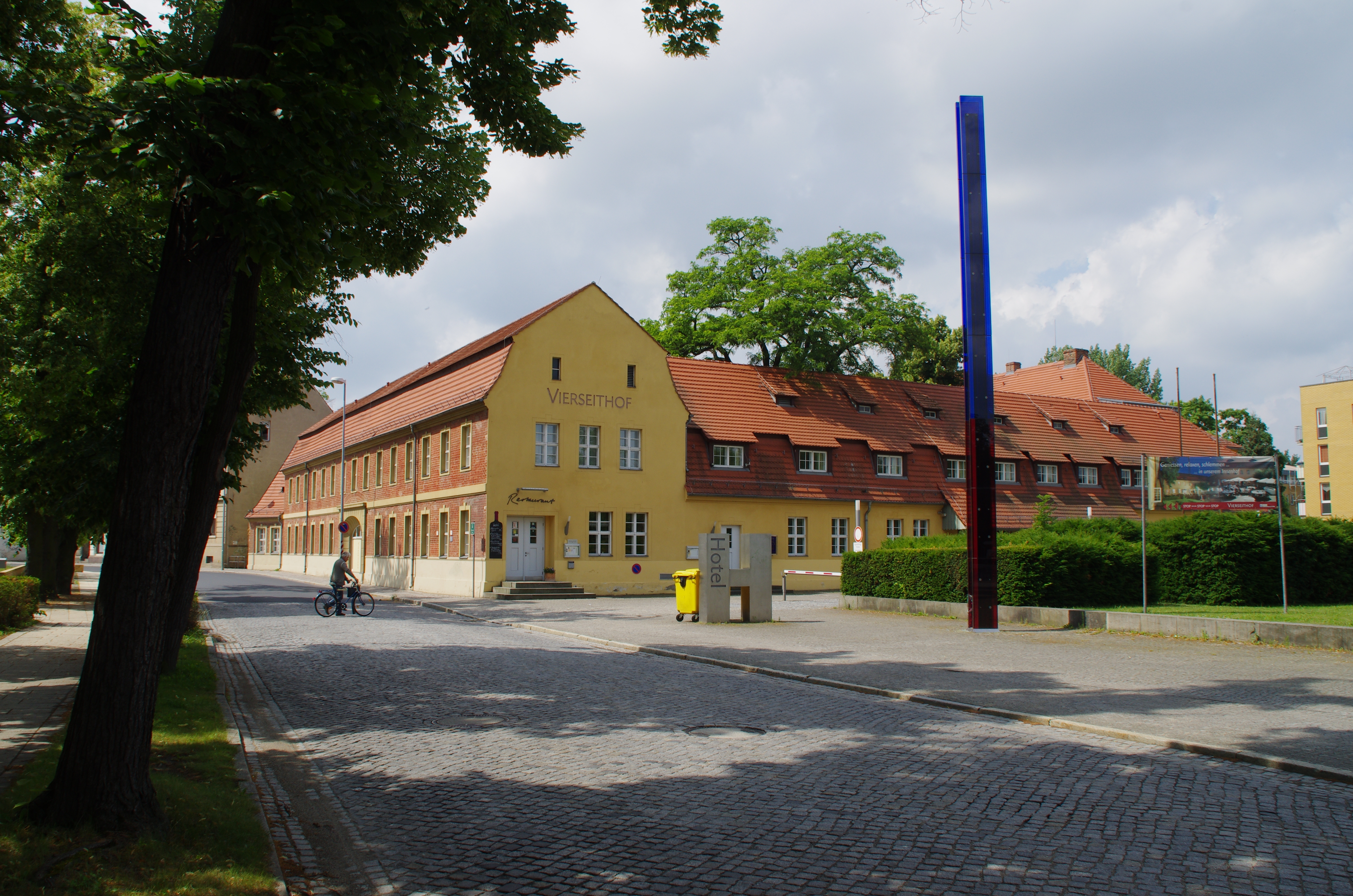 Luckenwalde in Brandenburg. Der Vierseithof steht unter Denkmalschutz. Heute ist es ein Hotel mit Restaurant.